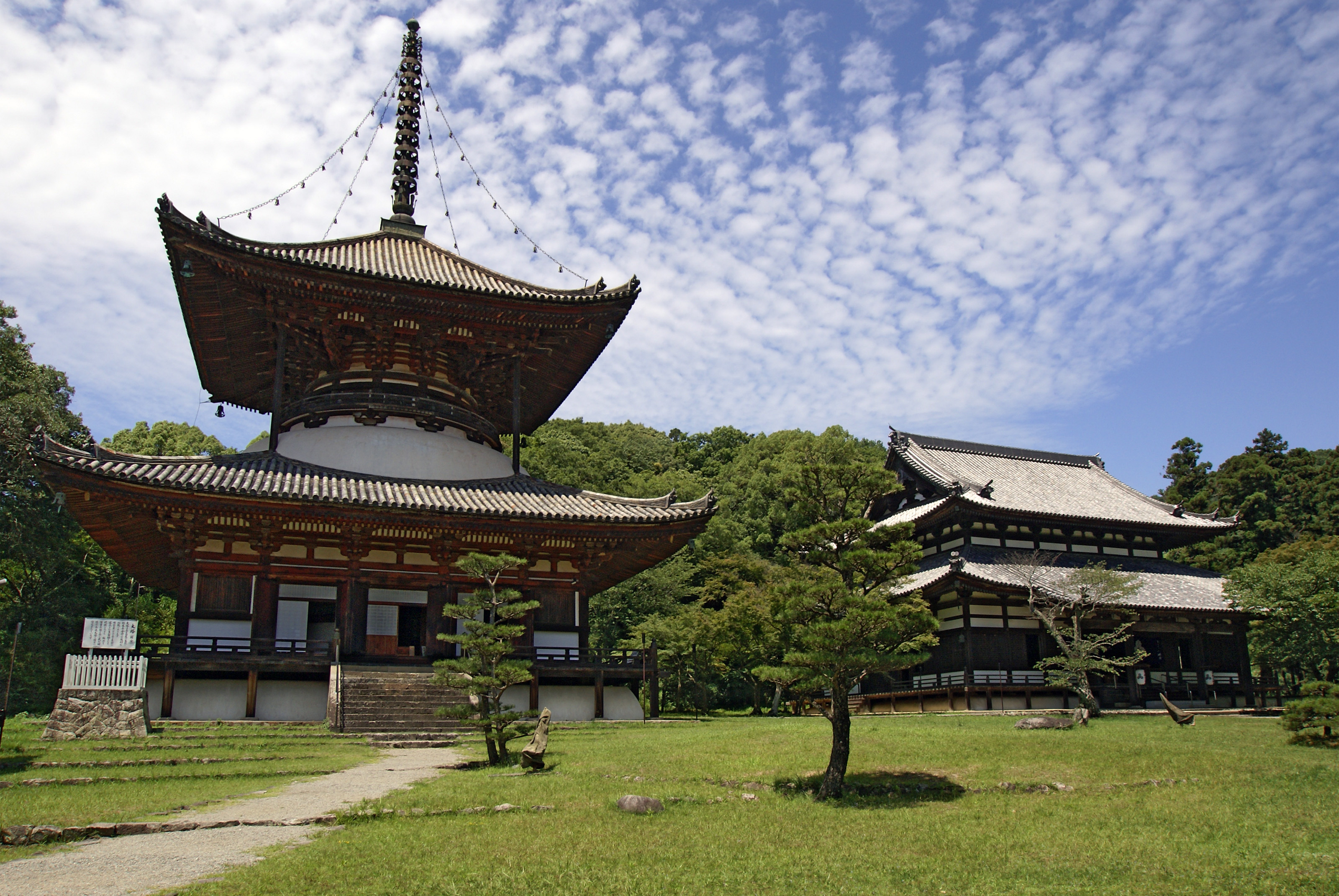 Negoroji in Iwade, Wakayama prefecture, Japan